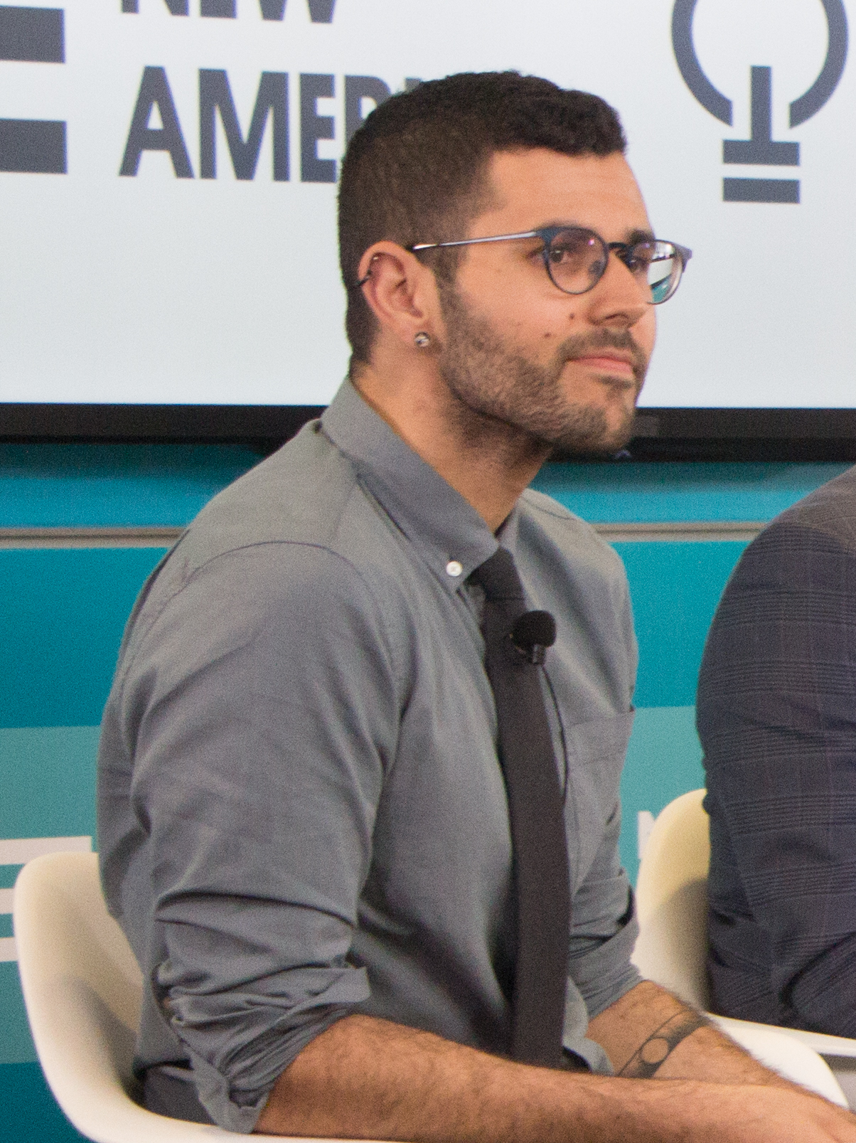 Carlos Maza, Correspondent, Vox